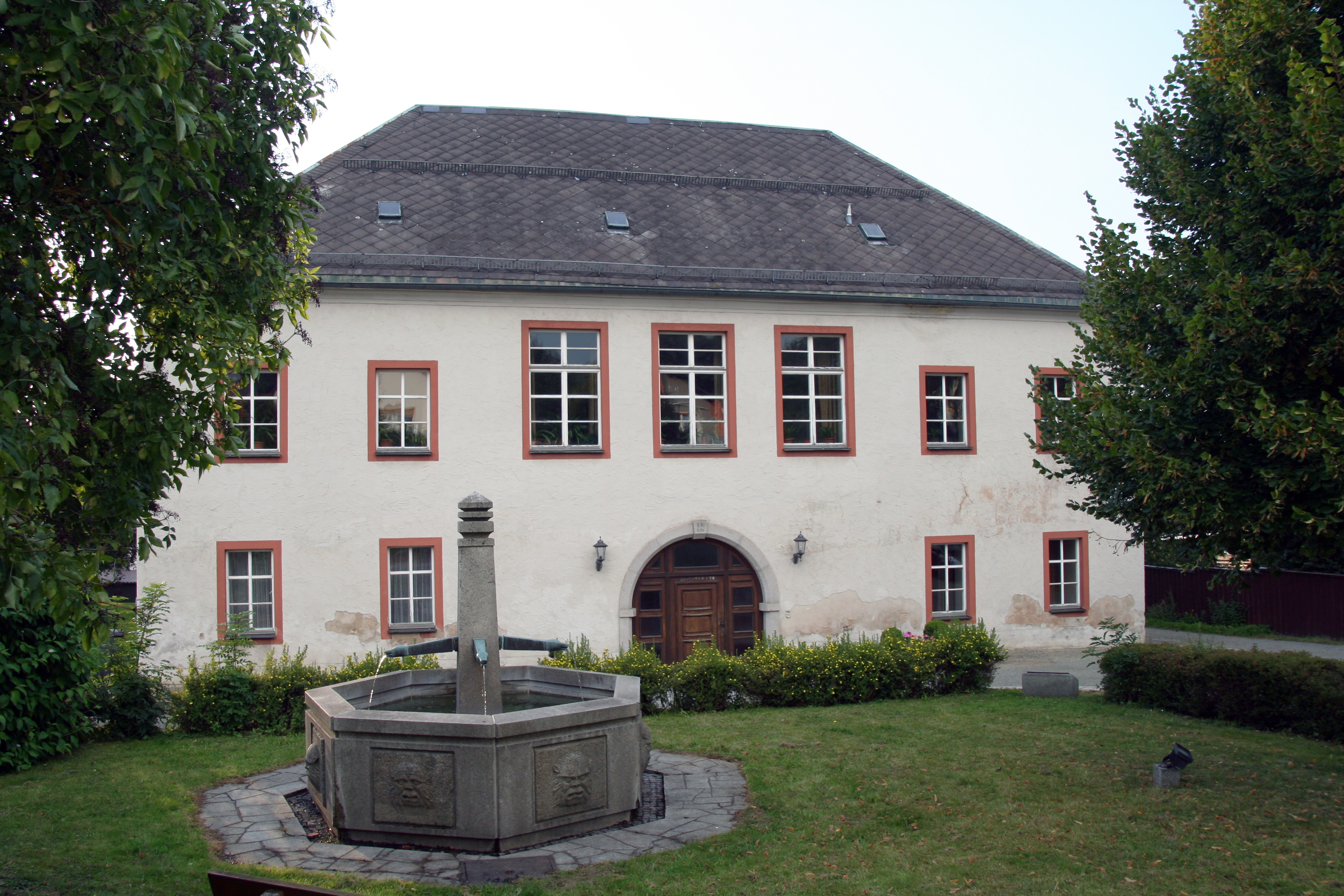 Schloss in WaldthurnThis is a photograph of an architectural monument.